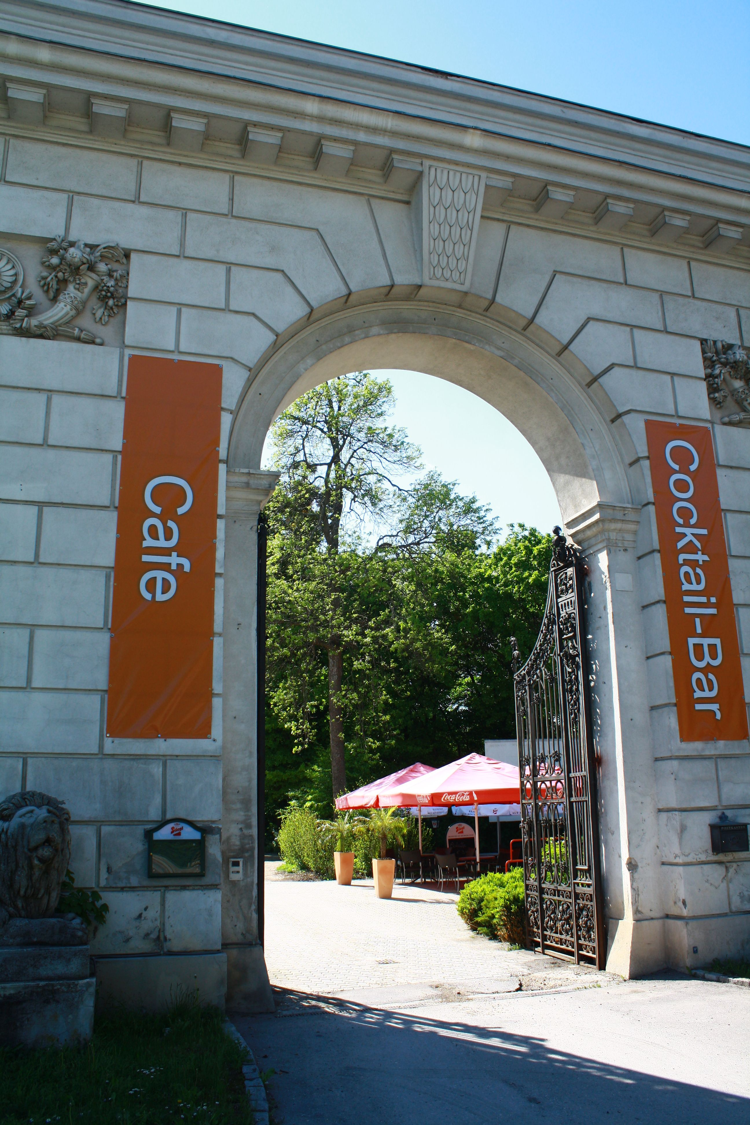 Löwentor in Günselsdorf in Niederösterreich